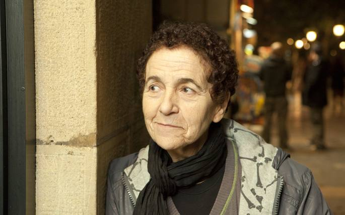 Empar Pineda 2010ean